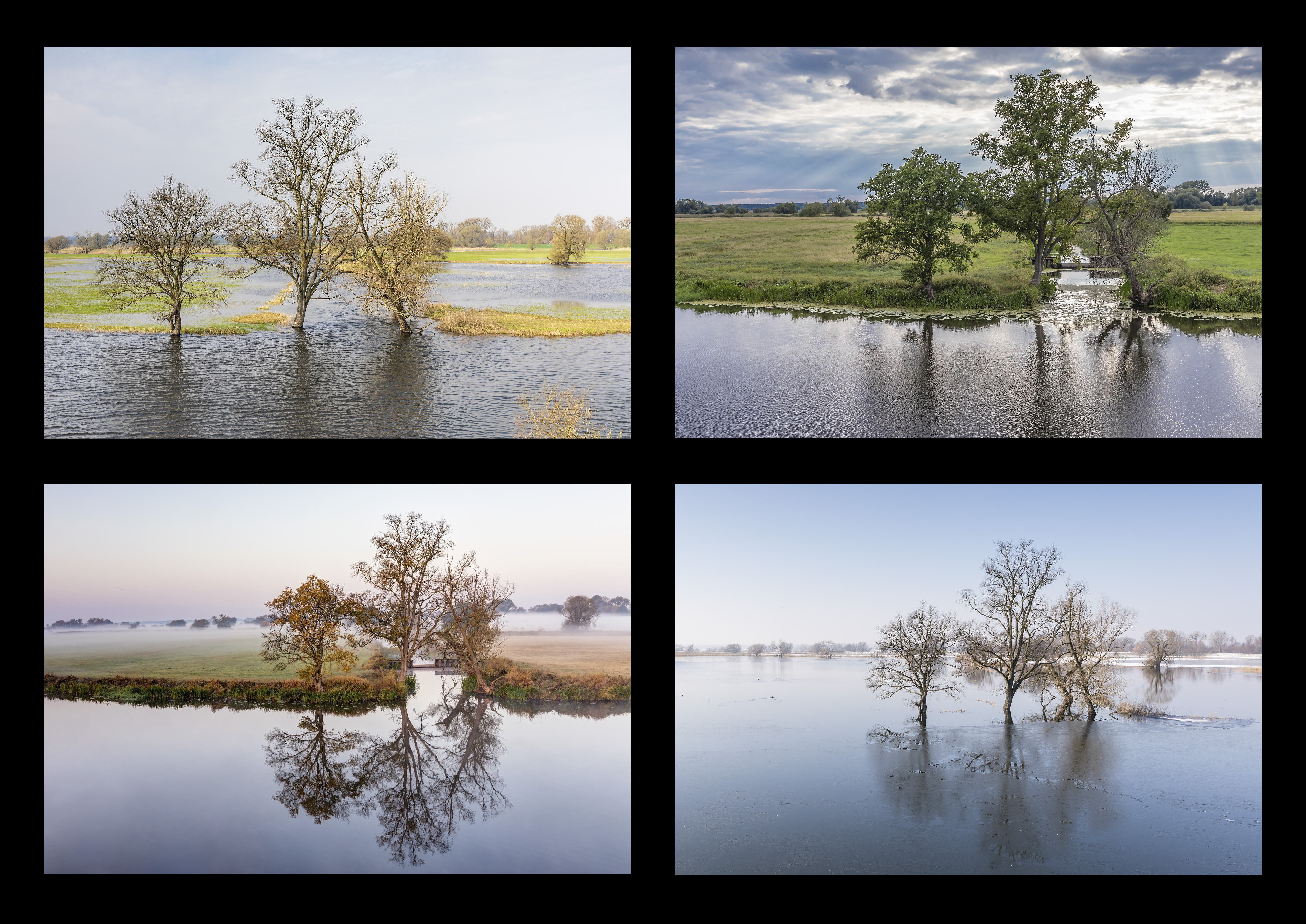 In diesem Bild zeige ich ein und dieselbe Stelle der Polder zu den verschiedenen Jahreszeiten, um die Unterschiede zu zeigen.